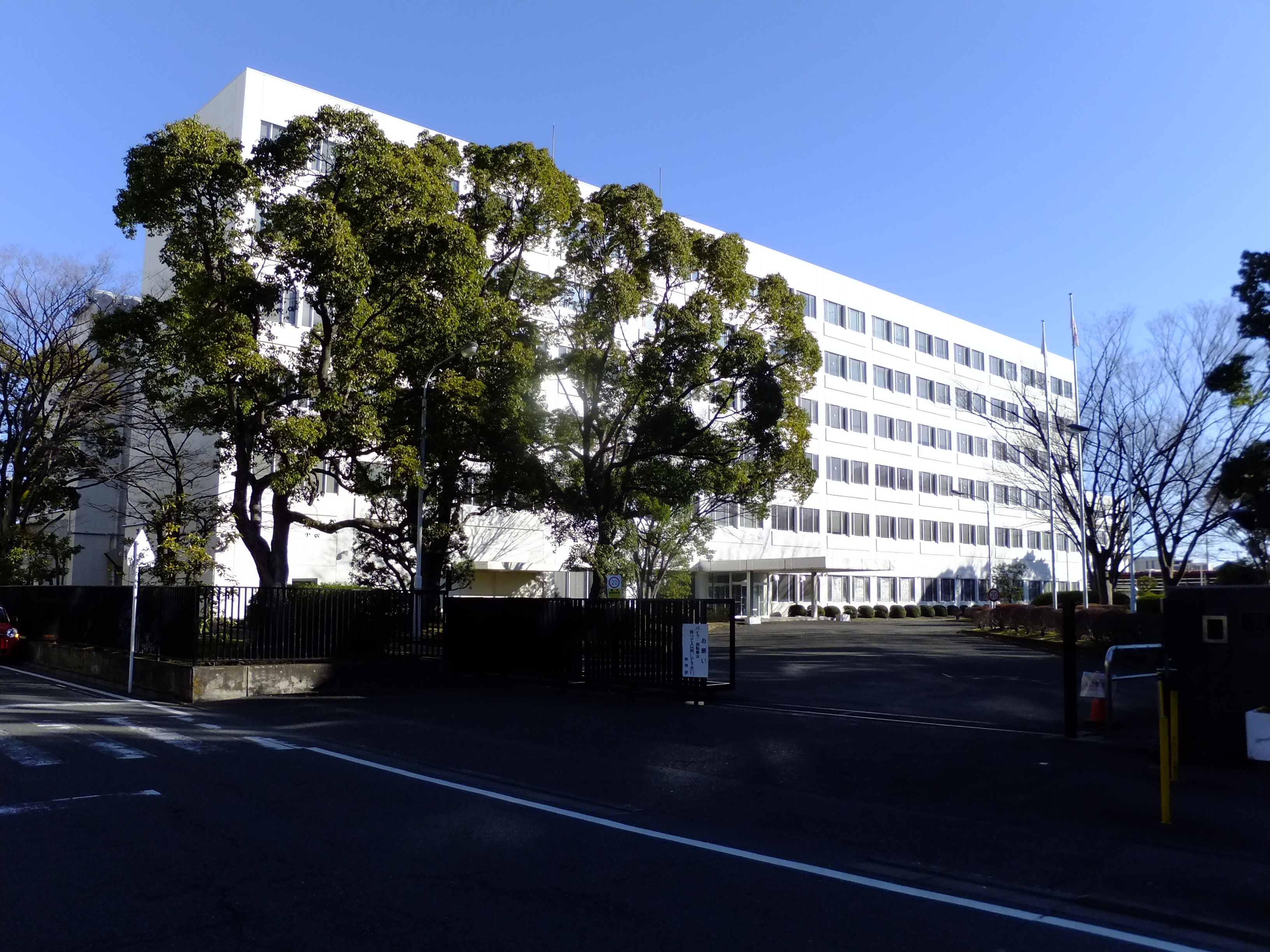 富士通研究所（川崎市中原区）